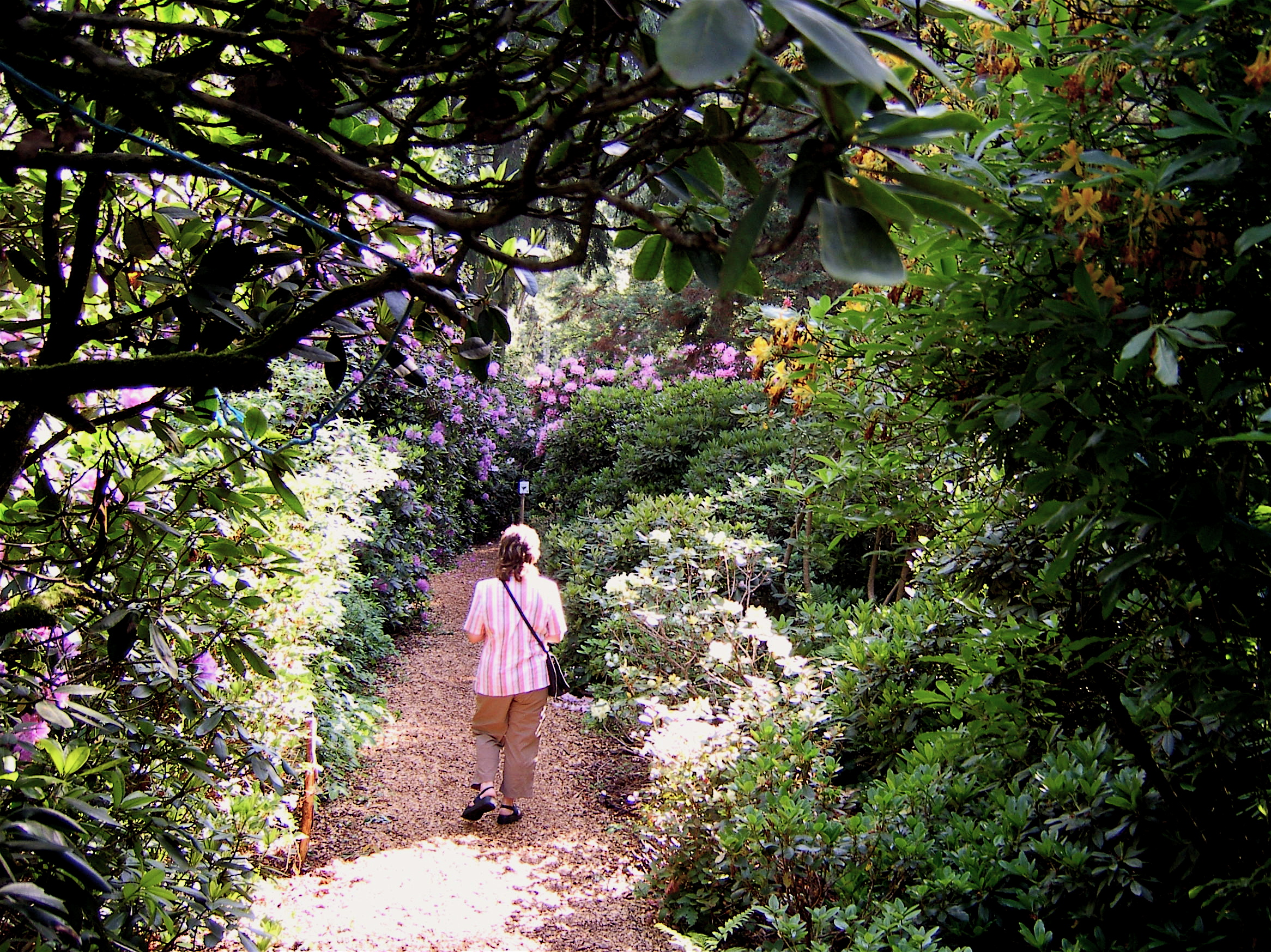 Seleger Moor. Blütenpracht.